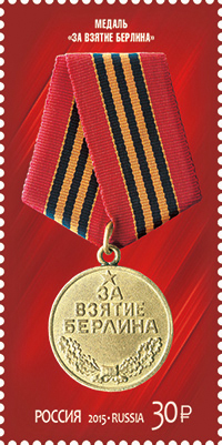 70 лет Победы в Великой Отечественной войне 1941–1945 гг. Медали (второй выпуск)